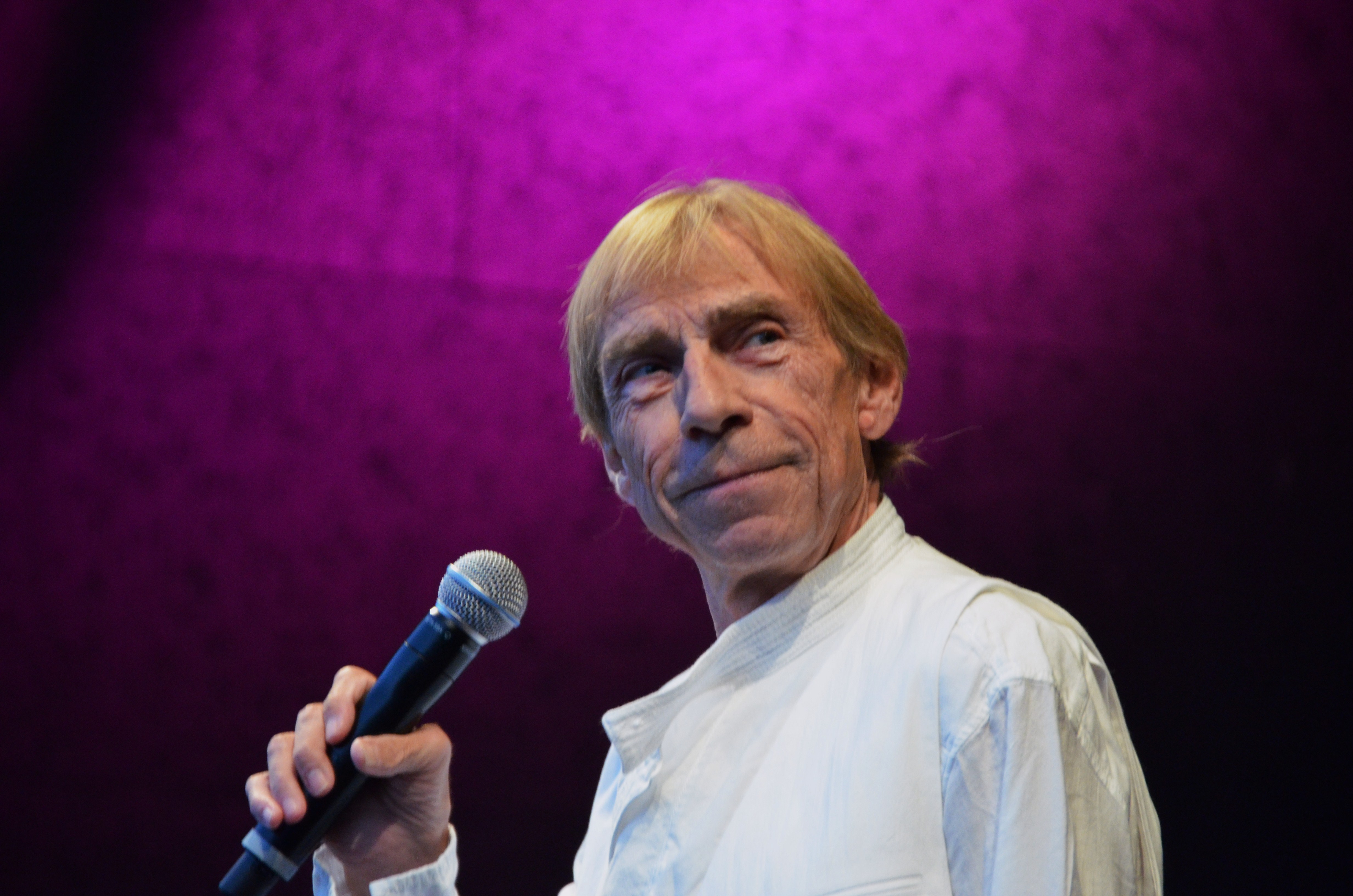 Jahn Teigen under en konsert i Langesund i 2011.